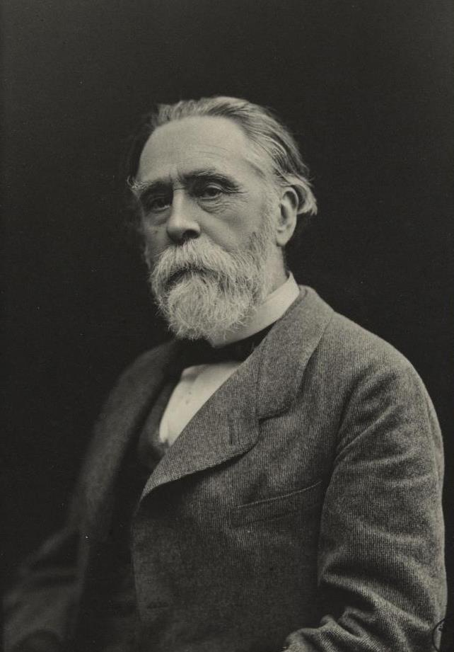 "Vauthier (Louis-Léger)".